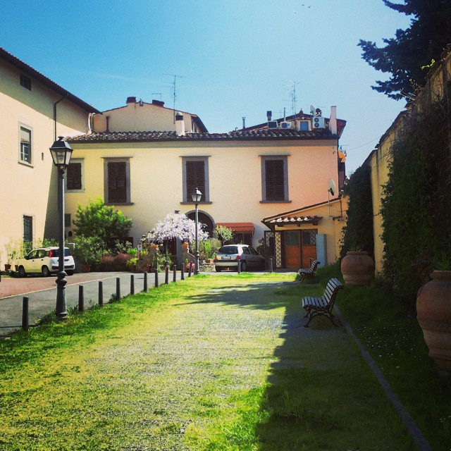 La Villa del Bandino oggi.